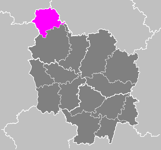 Maps of arrondissements and cantons of France: Arrondissement de Sens.PNG (Région Bourgogne)